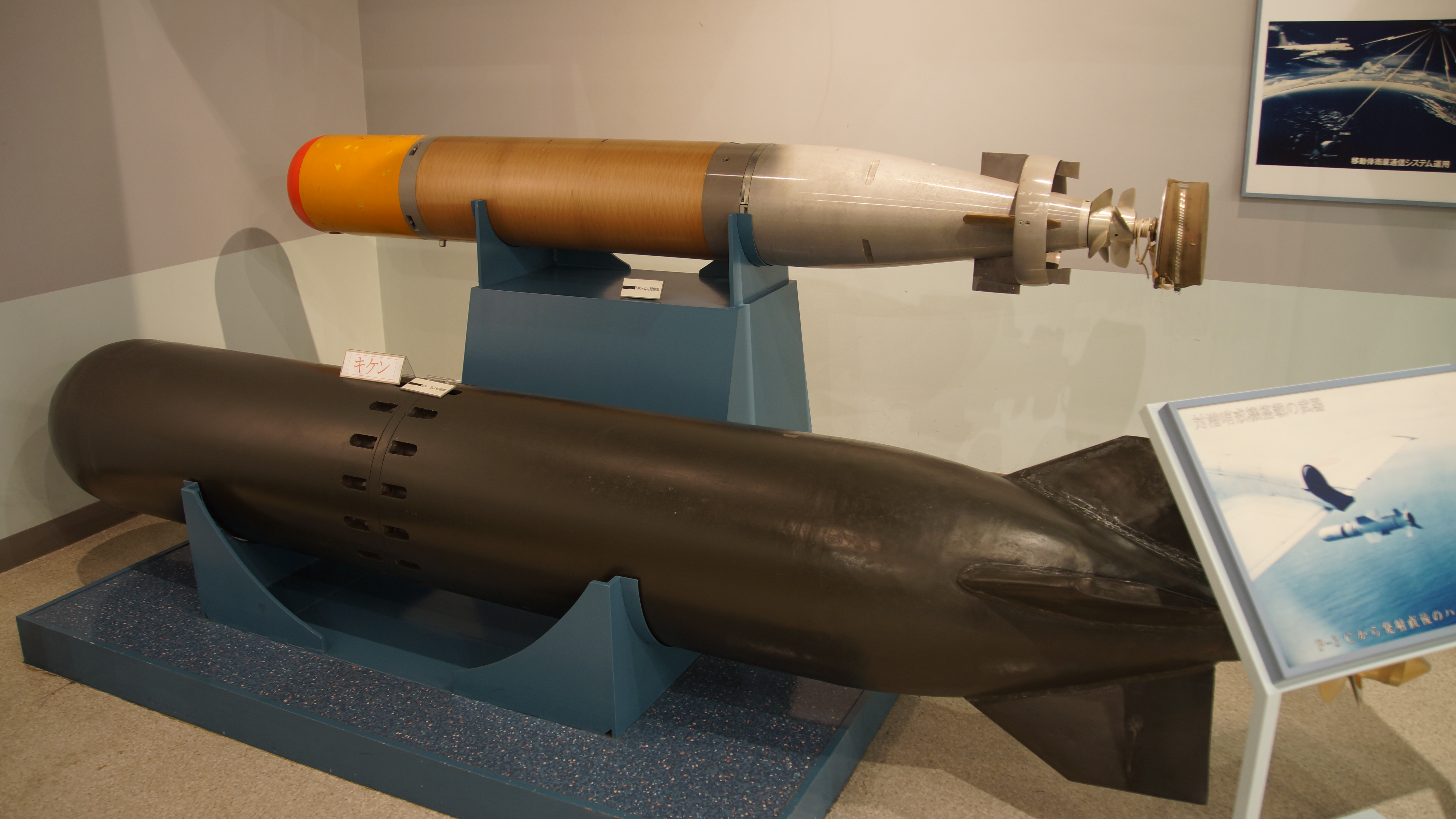 海上自衛隊 Mk-44短魚雷及びMk-34短魚雷 左後部。2017年4月29日 海上自衛隊鹿屋航空基地史料館内にて。